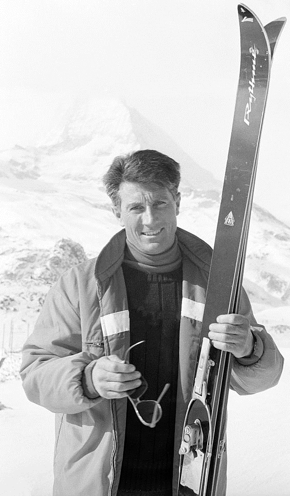 Italian climber Walter Bonatti. Zermatt, 1965.